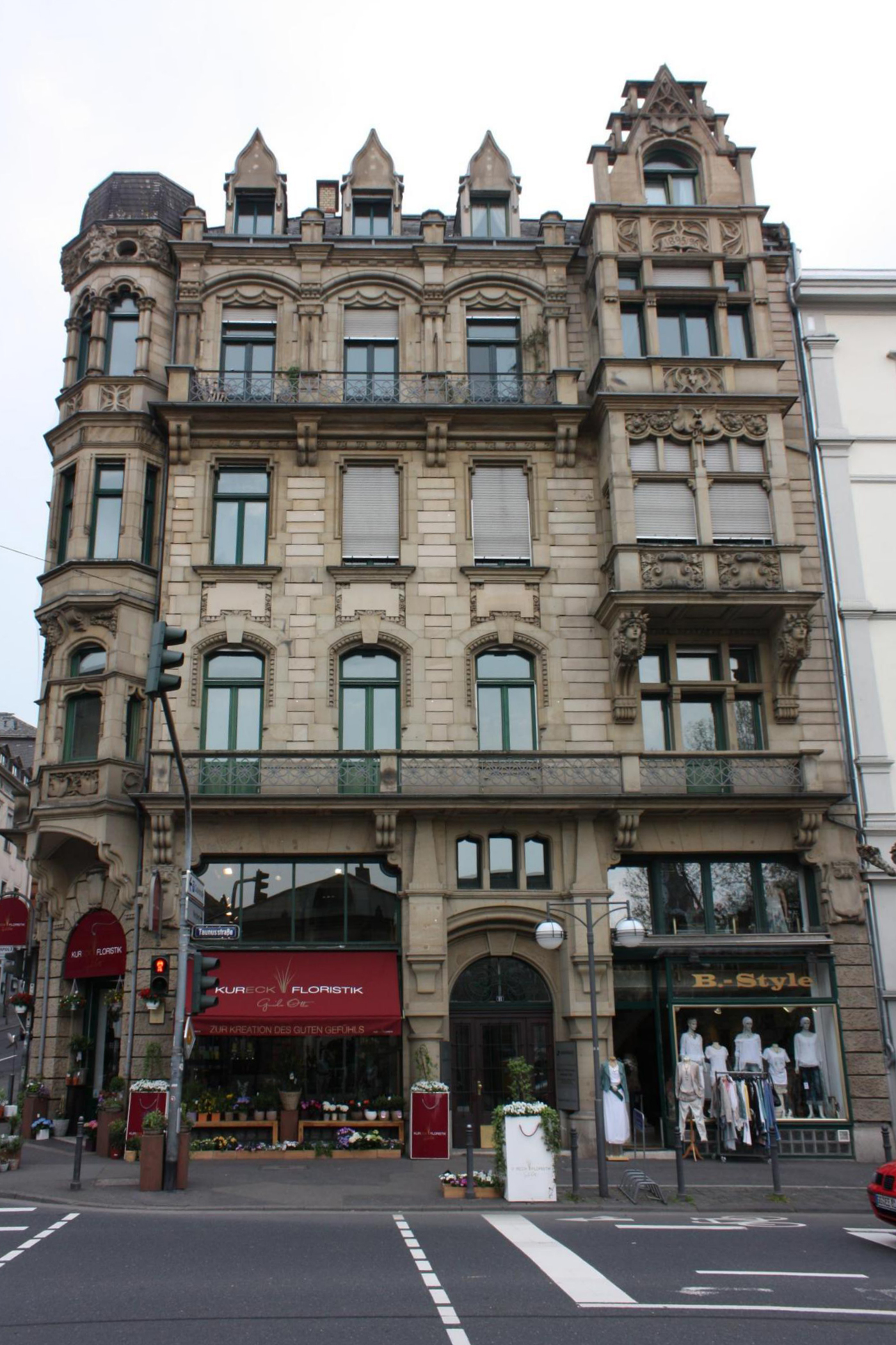 Das Gebäude Taunusstraße 11 in Wiesbaden. Von hier koordinierte William H. Tunner die Berliner Luftbrücke 1948/49.